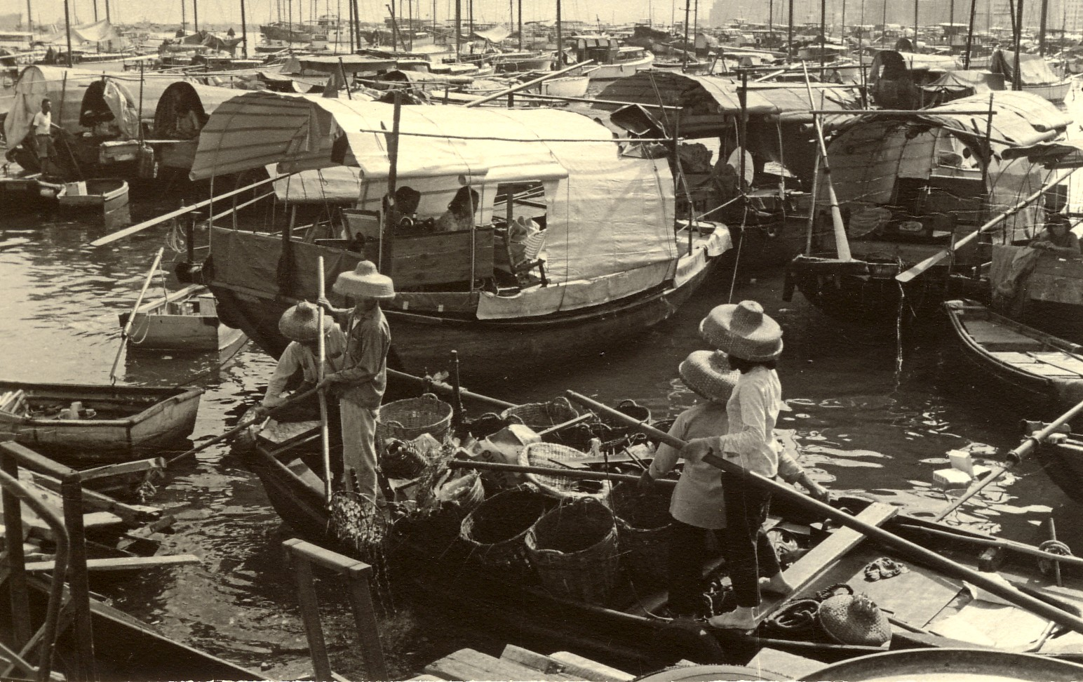 Floating sampan village in Hong Kong 1965